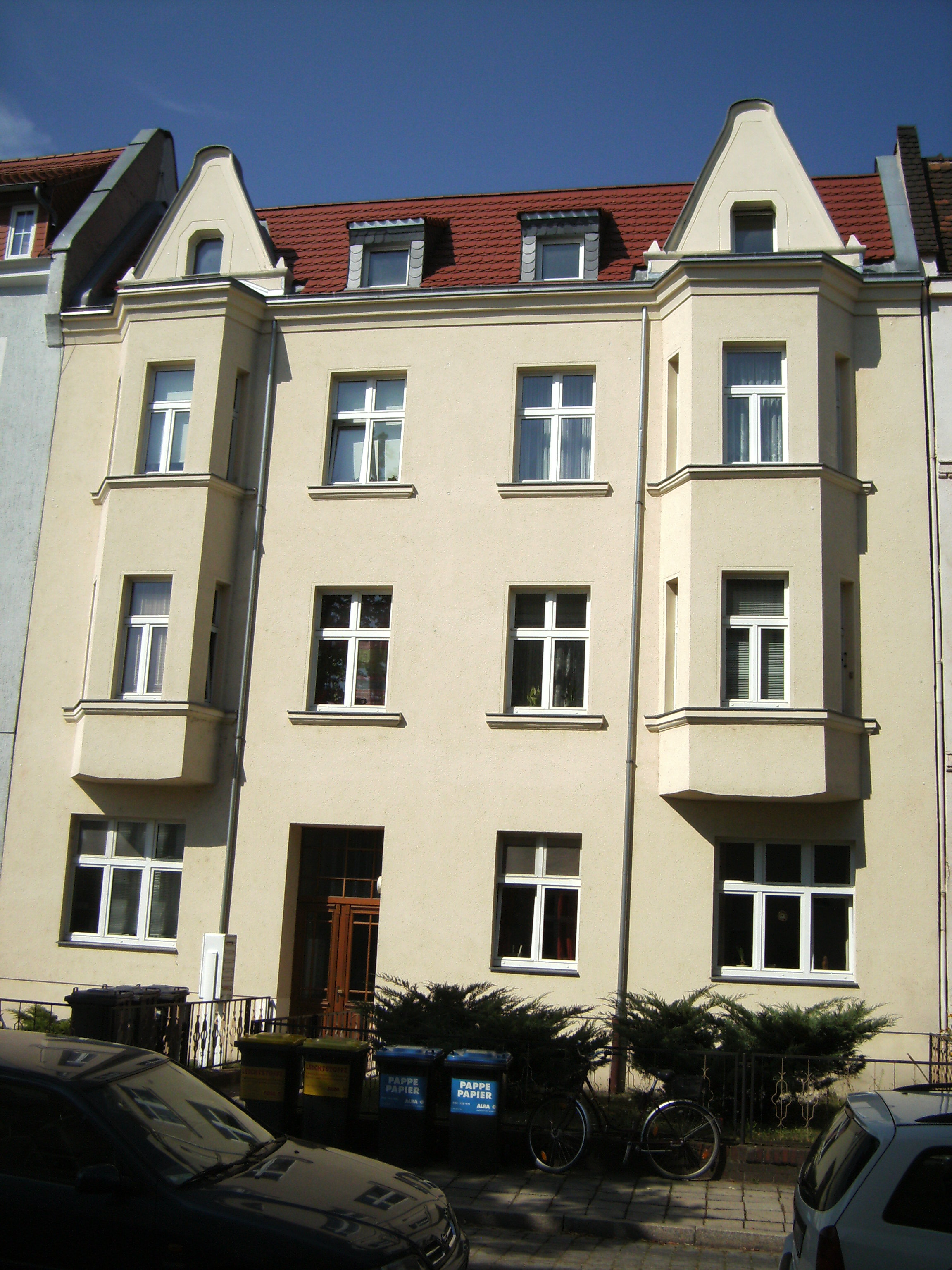 Wernerstr. 38